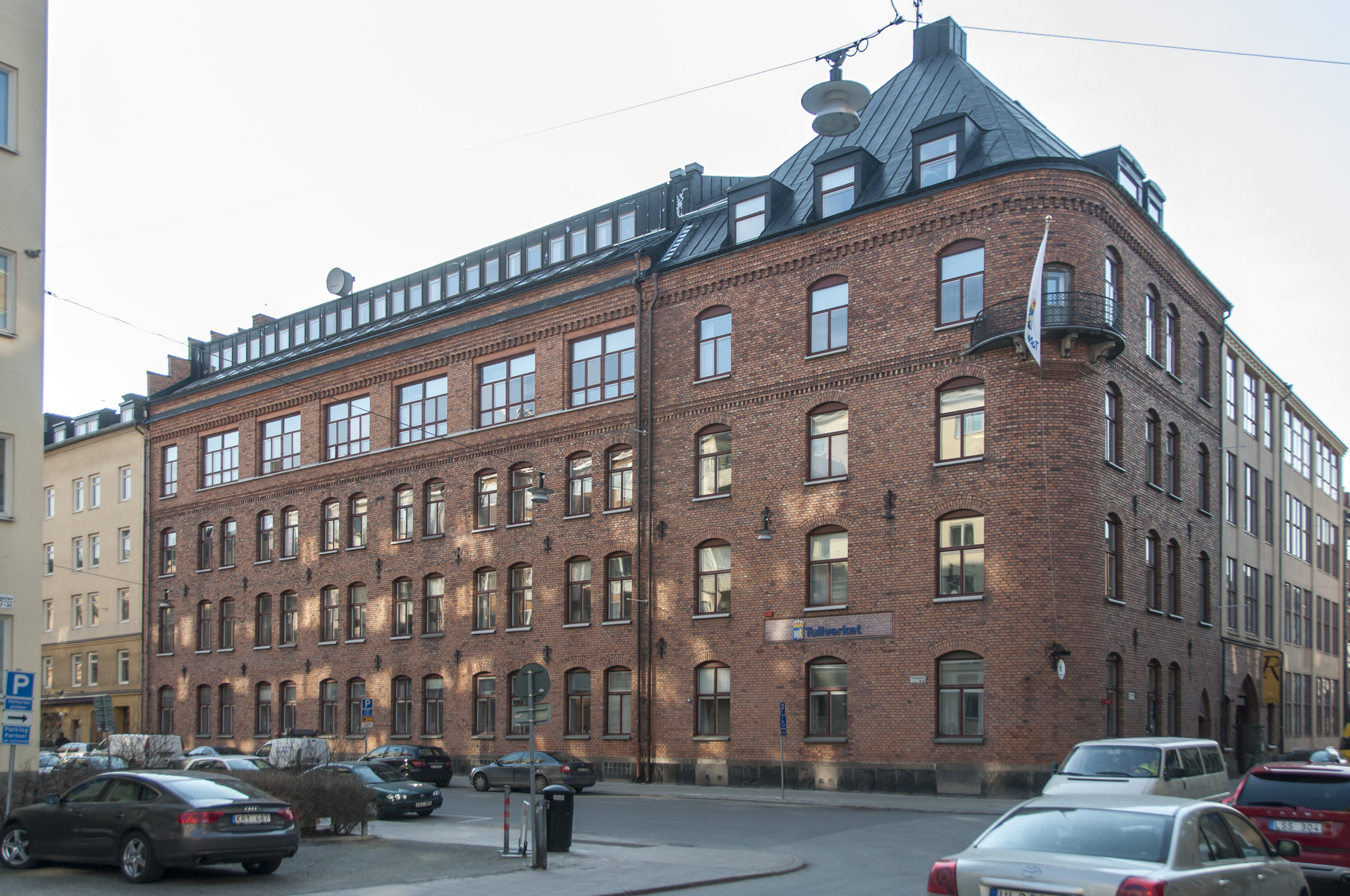 Dykaren 10, Alströmergatan 39, Arbetargatan 35, Nybyggnadsår 1898 - 1899, Arehn G. Mekaniska Verkstads AB (Byggherre) C. Pettersson (Byggmästare) G. Lindgren (Arkitekt)